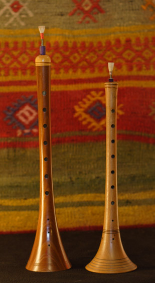 Deux zournas. Celle de gauche est turque, celle de droite est syrienne.